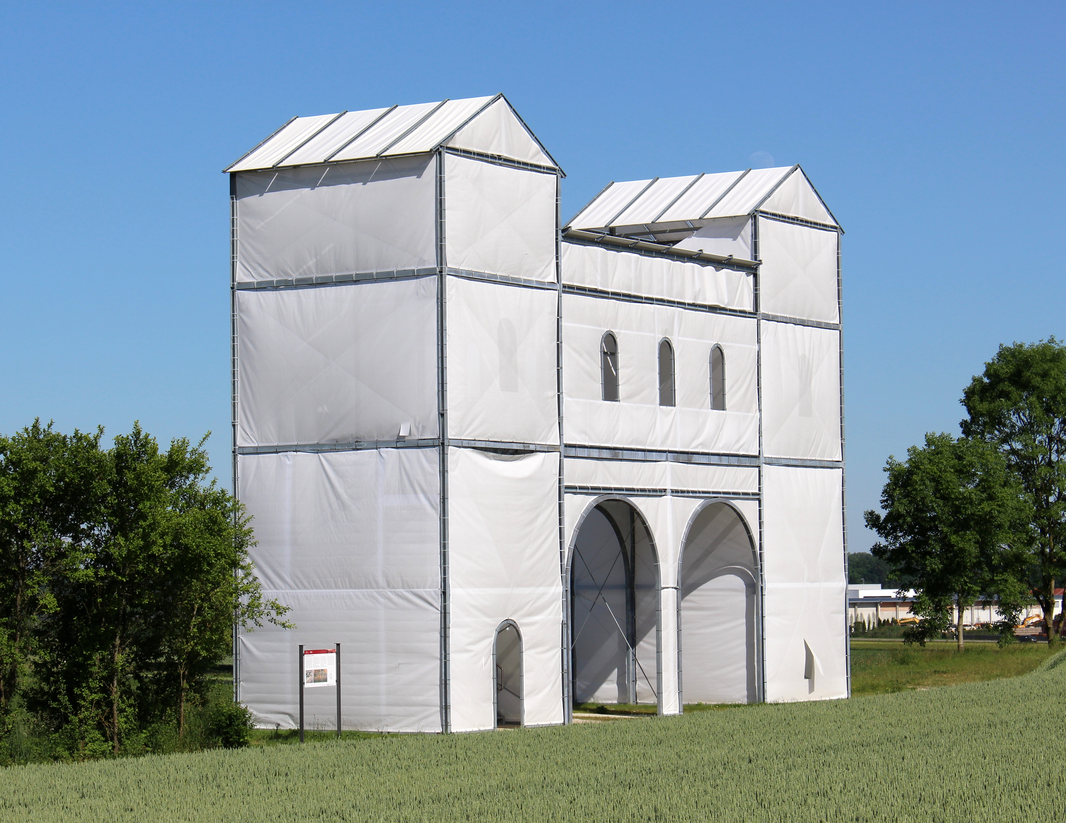 Touristische Erschließung des Kastells Pförring, Landkreis Eichstätt, Oberbayern: Nachbildung des Osttores